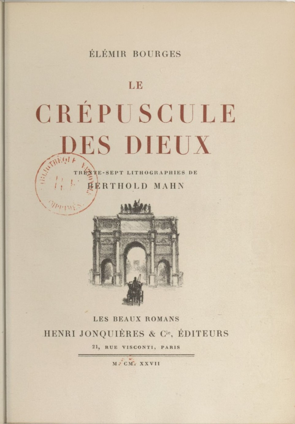 couverture